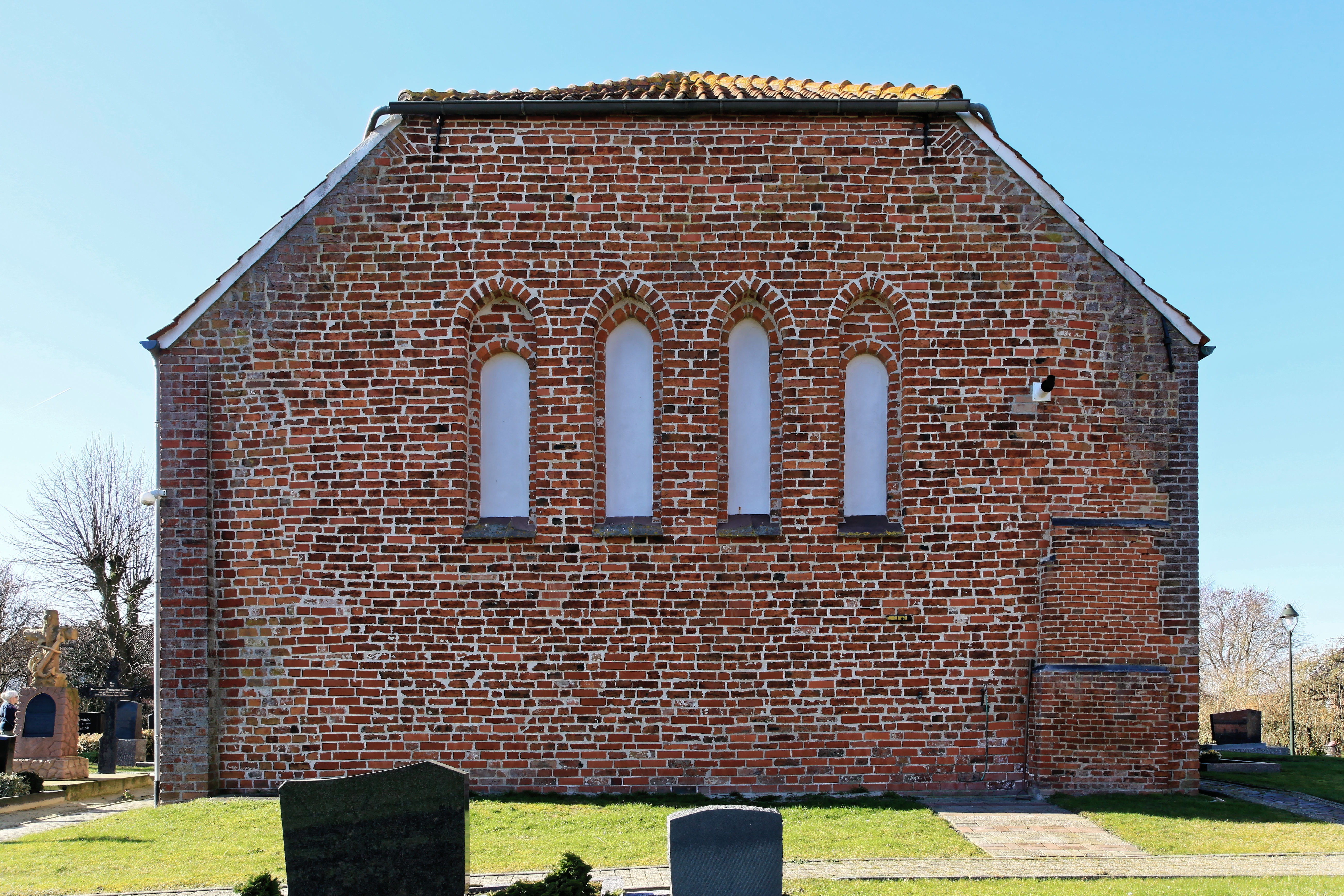 Kirche, Turmweg in Oldendorp, Jemgum